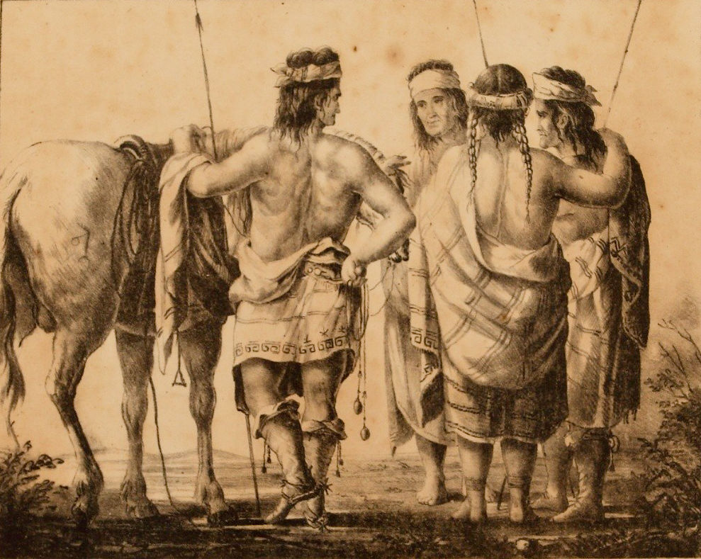 Carlos Morel, Indios pampas (Serie Ibarra). Siglo XIX. Visible: 25 x 28 cm Llitografía: 21 x 26,5 cm, litografía sobre papel. Inv. 8073.